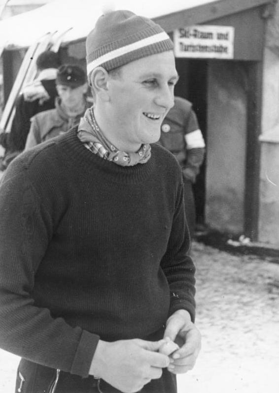 Roman Wörndle, Abfahrt und Slalon Deutschland.